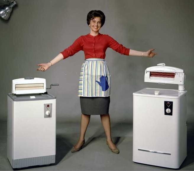 Evalet vaskemaskiner, kvinne. reklameopptak.